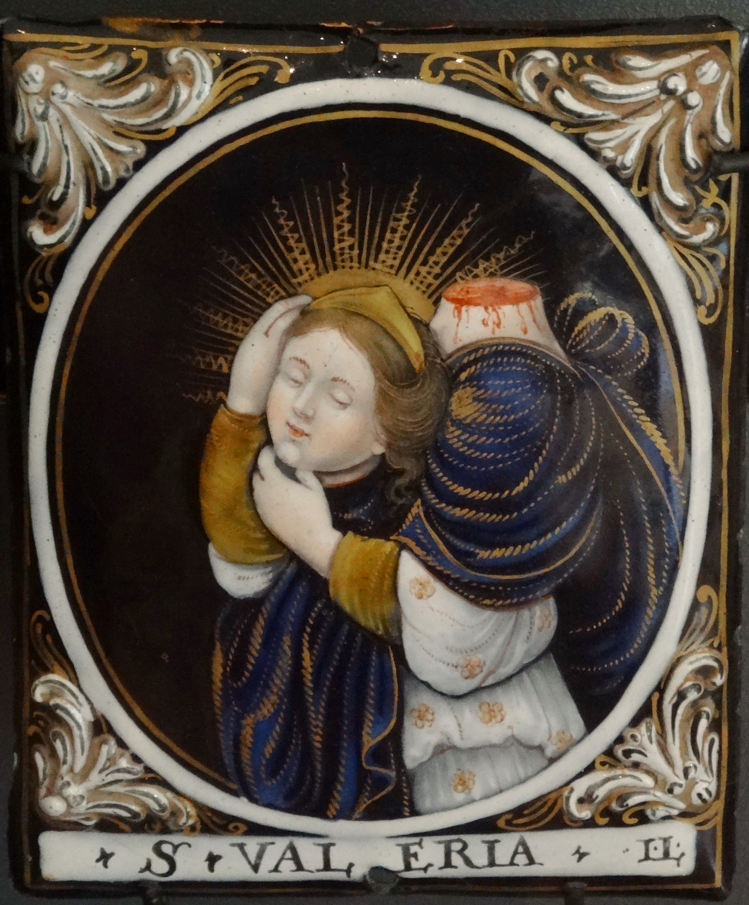 Лиможская эмаль (художественная эмаль)